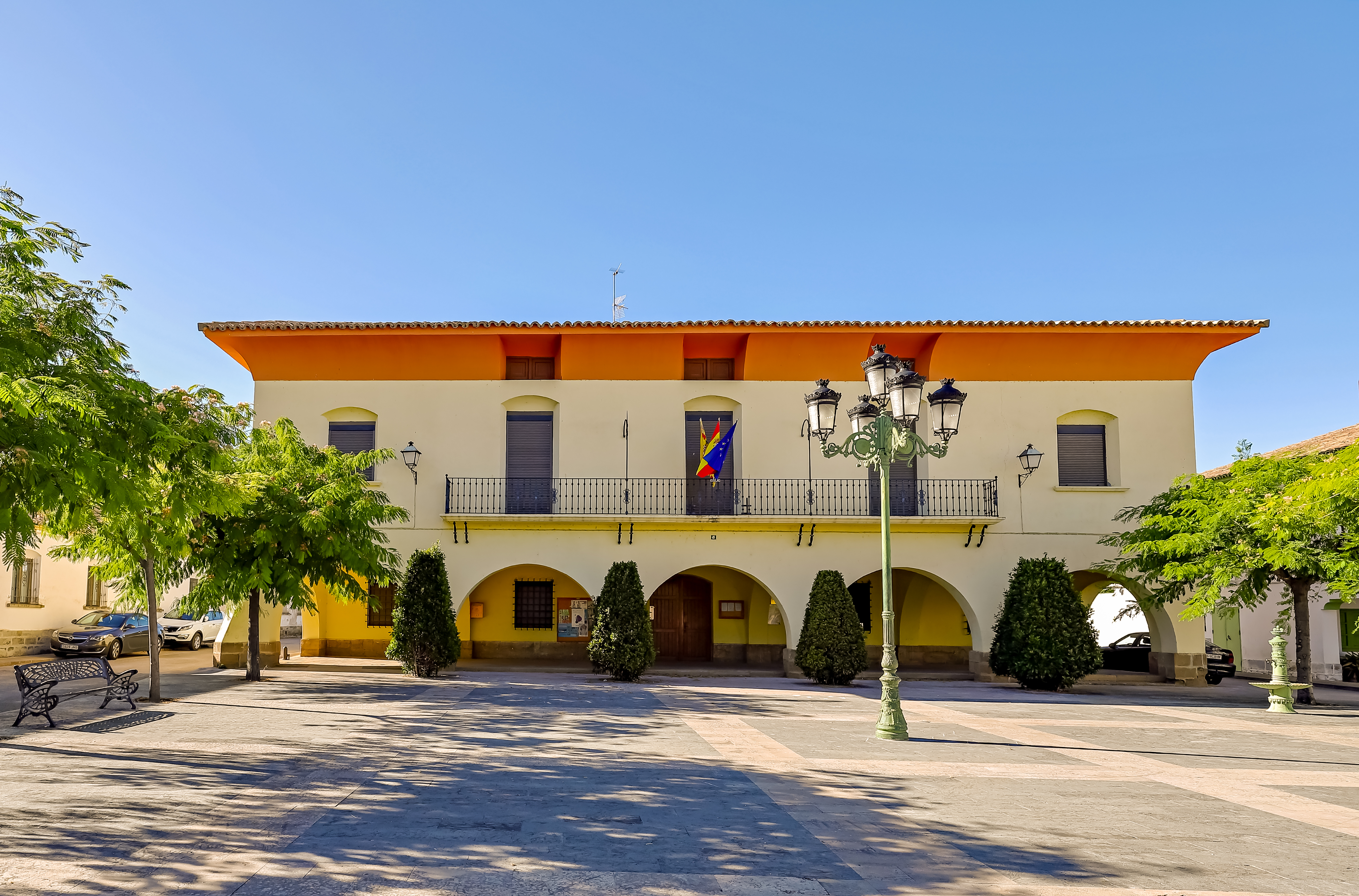 Banastás es un municipio de la comarca Hoya de Huesca, en la provincia de Huesca.